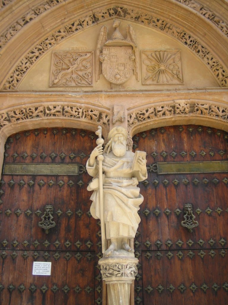 Imagen de Santiago Apostol y el escudo de los Reyes Católicos, Iglesia de Santiago, Orihuela.